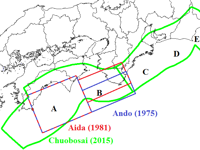 安政南海地震の断層モデル, Ando(1975), Aida(1981), 南海トラフの巨大地震モデル検討会